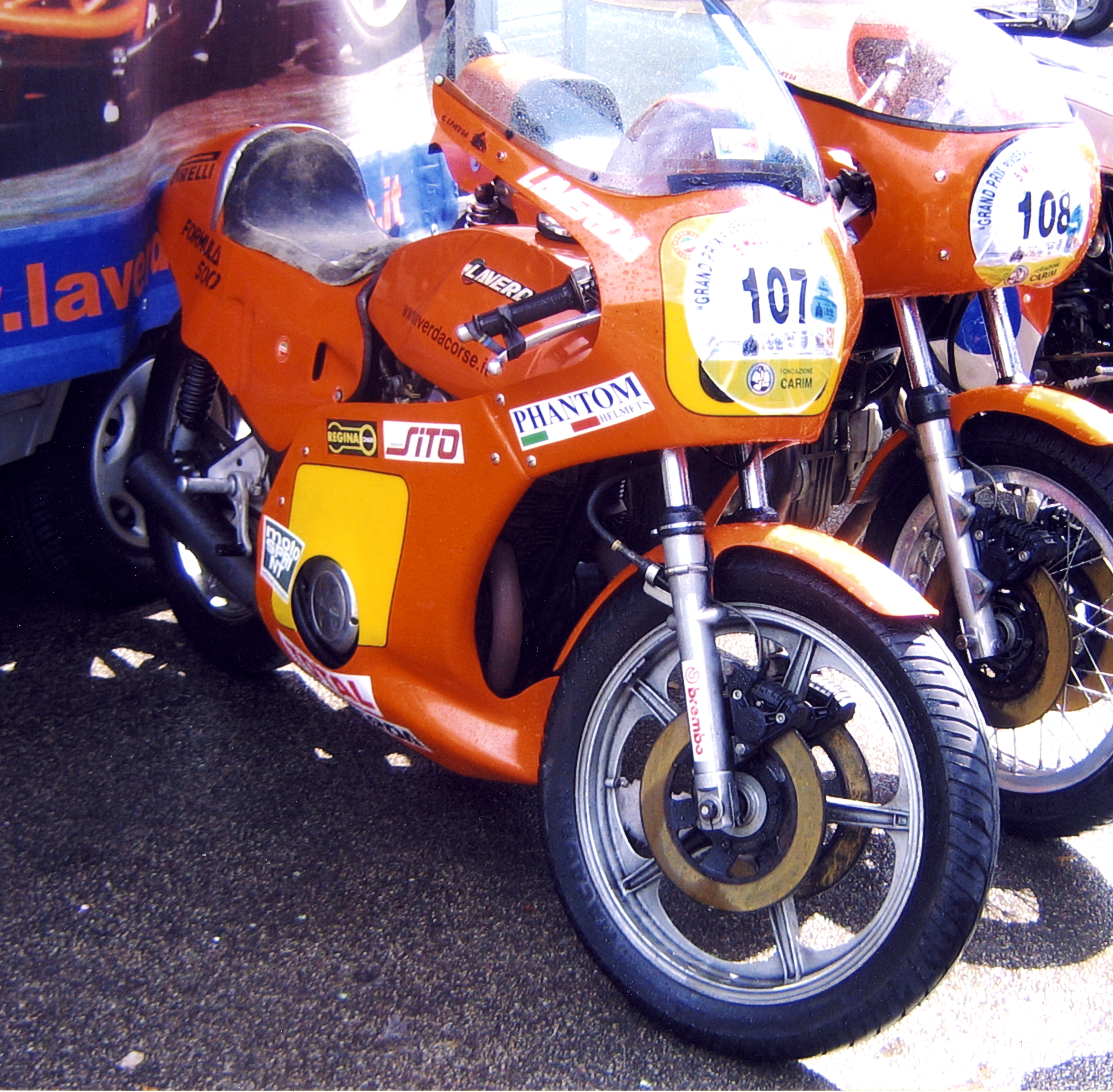 Laverda 500 Formula, esposta a Rimini durante il Pasolini Day del 2007